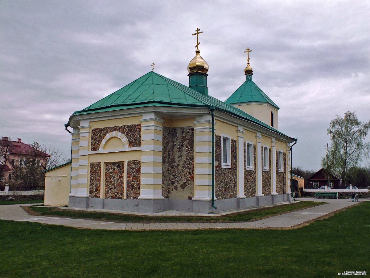 Астрамечава. Свята-Міхайлаўская царква